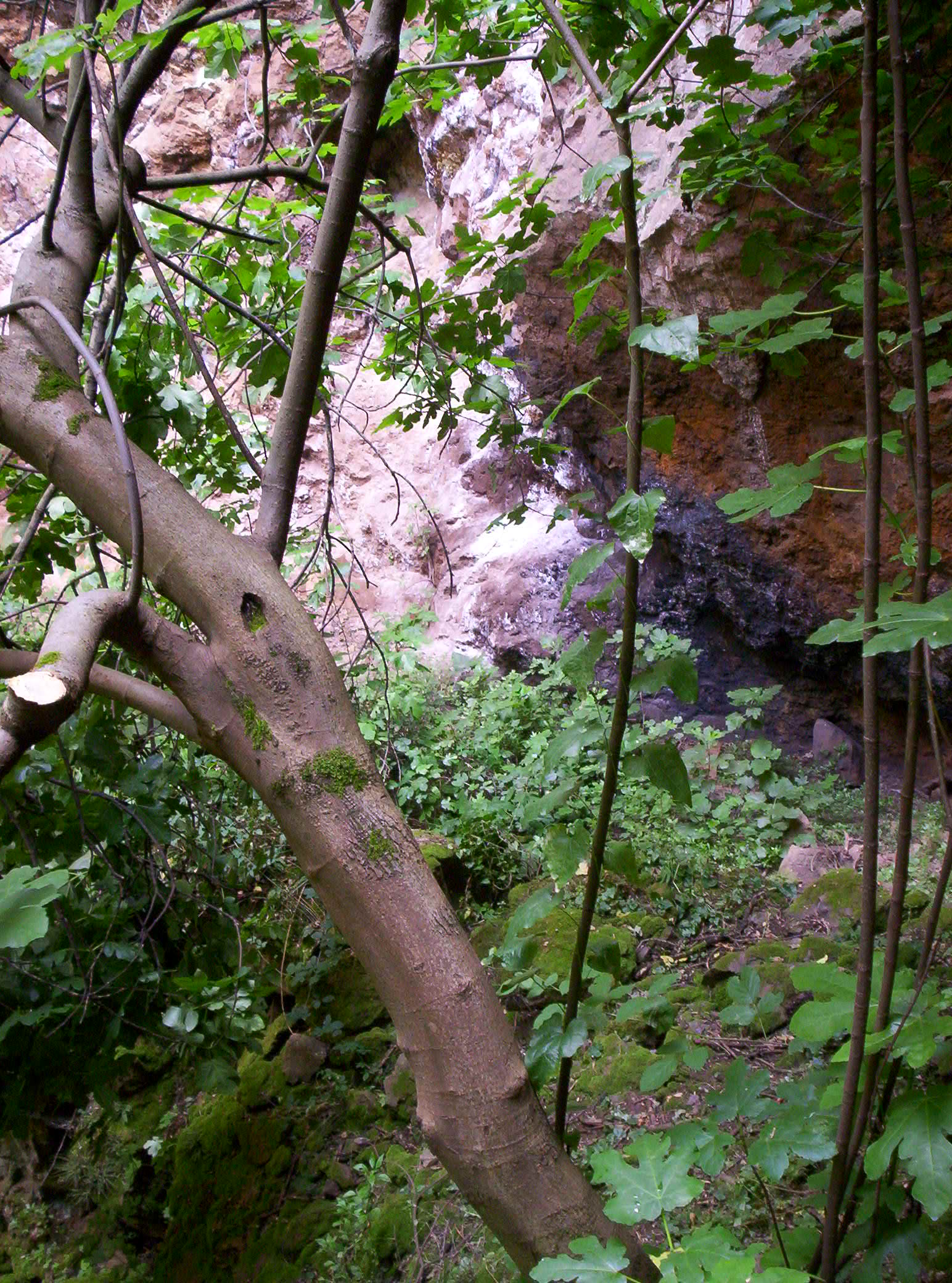 Nueza negra enroscada en una higuera - Ecosistema del interior de Mina la Jayona - Fuente del Arco (Badajoz, España)